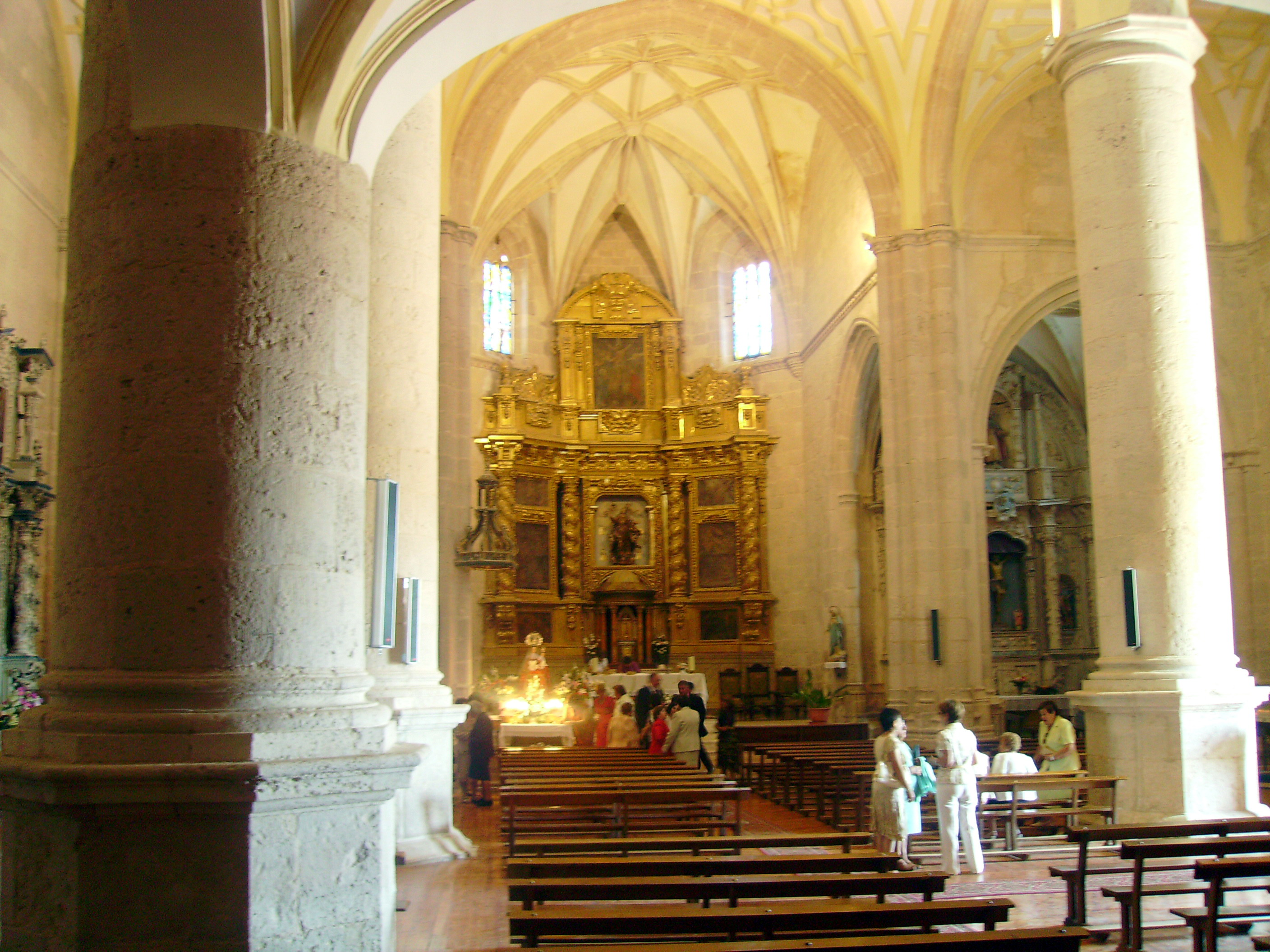 Imagen del interior de la iglesia de Nuestra Señora de la Asunción, en Olmedillo de Roa, Comarca de Duero. Consta de tres naves, muros de piedra y sillería de aparejo regular. La cabecera tiene ventanas góticas, interior con bóveda estrellada en falso crucero, grandes pilastras y dos arcos góticos. El salón tiene doce tramos de bóveda sobre pilares de base poligonal y sección circular, con cubierta de falsa bóveda de ladrillo con decoración de yesones -excepto en el cuarto tramo que se aboveda con crucería reticular y de combados-. Alberga un retablo de Nuestra Señora de Basardilla, de mediados del XVII, un receptáculo del siglo XVIII, realizado por Manuel Sandoval y un tabernáculo del siglo XIX de Pedro Munar.